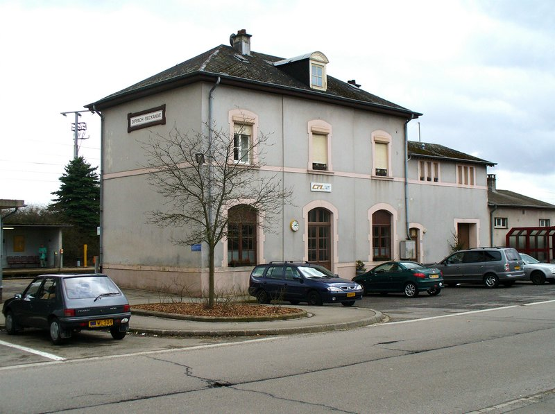 Sujet: Gare Dippech-Reckeng Source: Eege Foto vum User:Pecalux